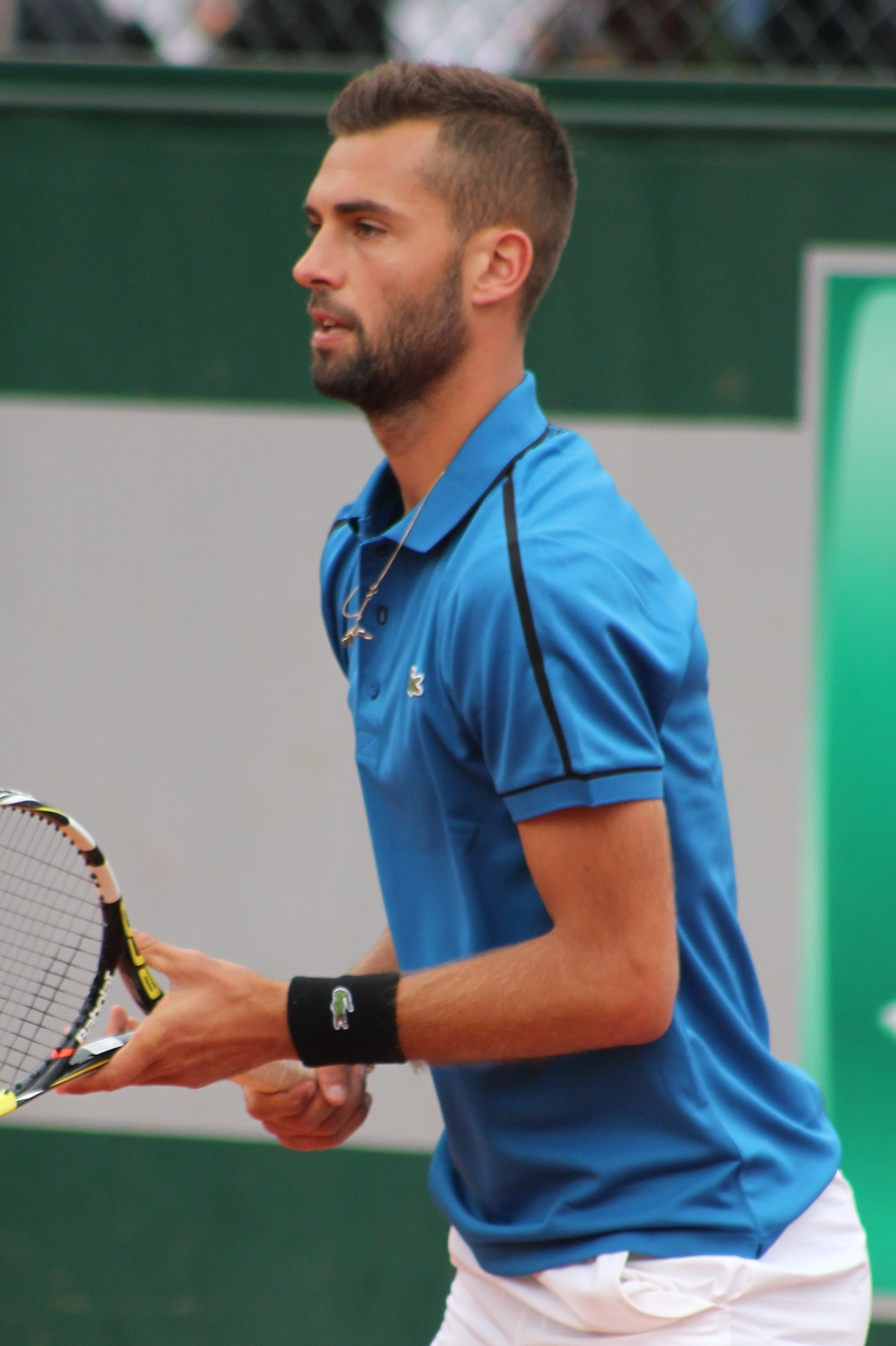 Paire RG15 (10)